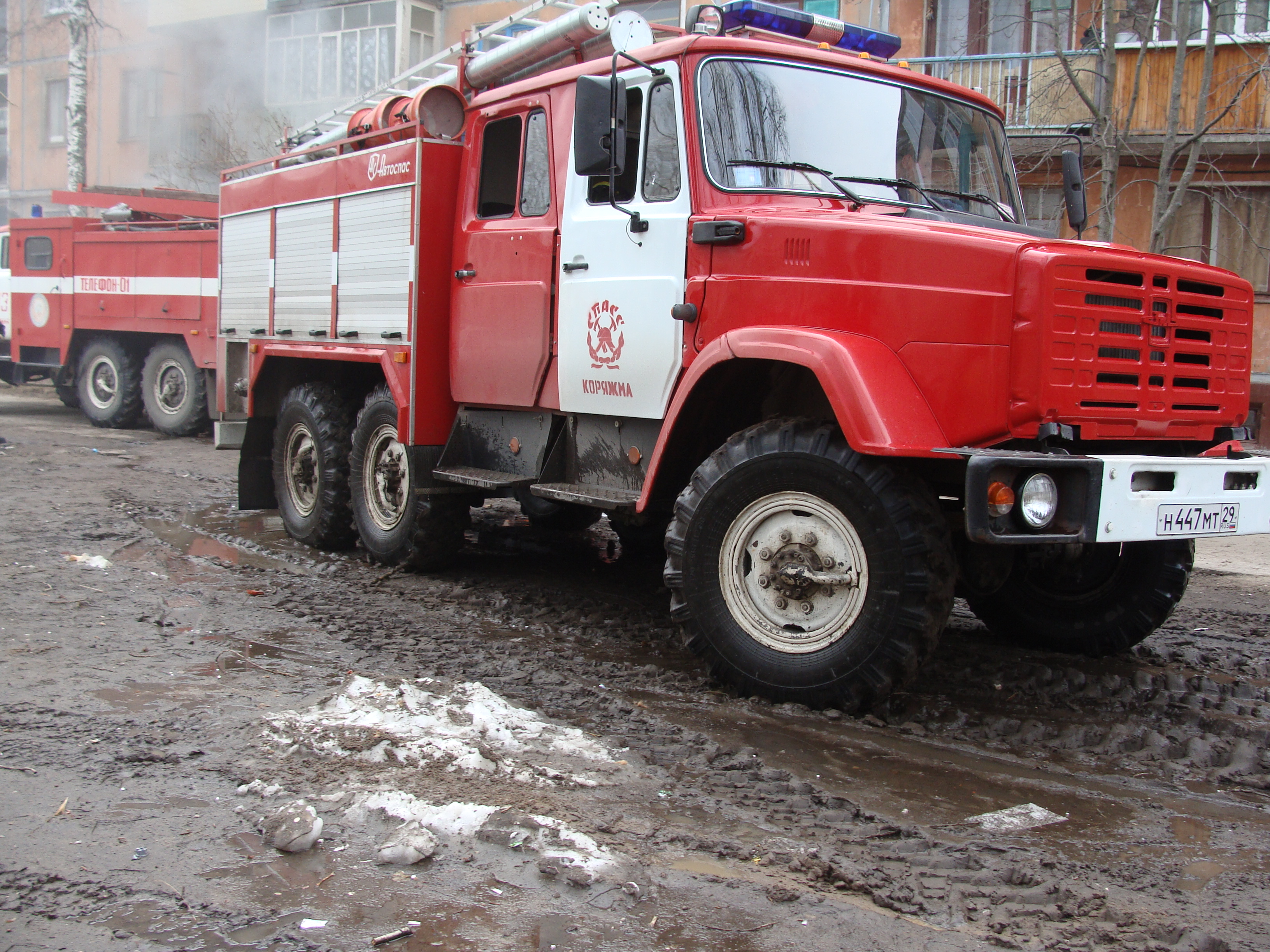 Тушение пожара в подвале дома Набережная 54а, Коряжма